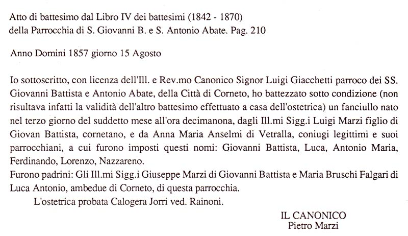 Traduzione Certicficato di battesimo